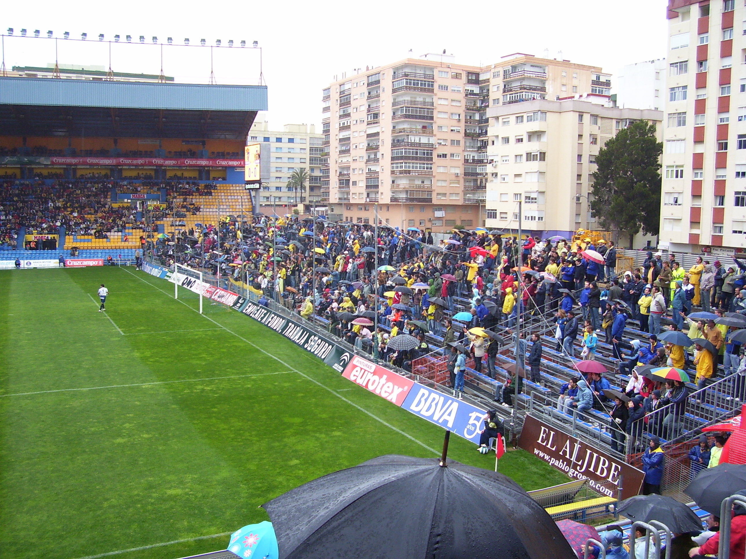 Grada supletoria de Fondo Norte del Estadio Ramón de Carranza